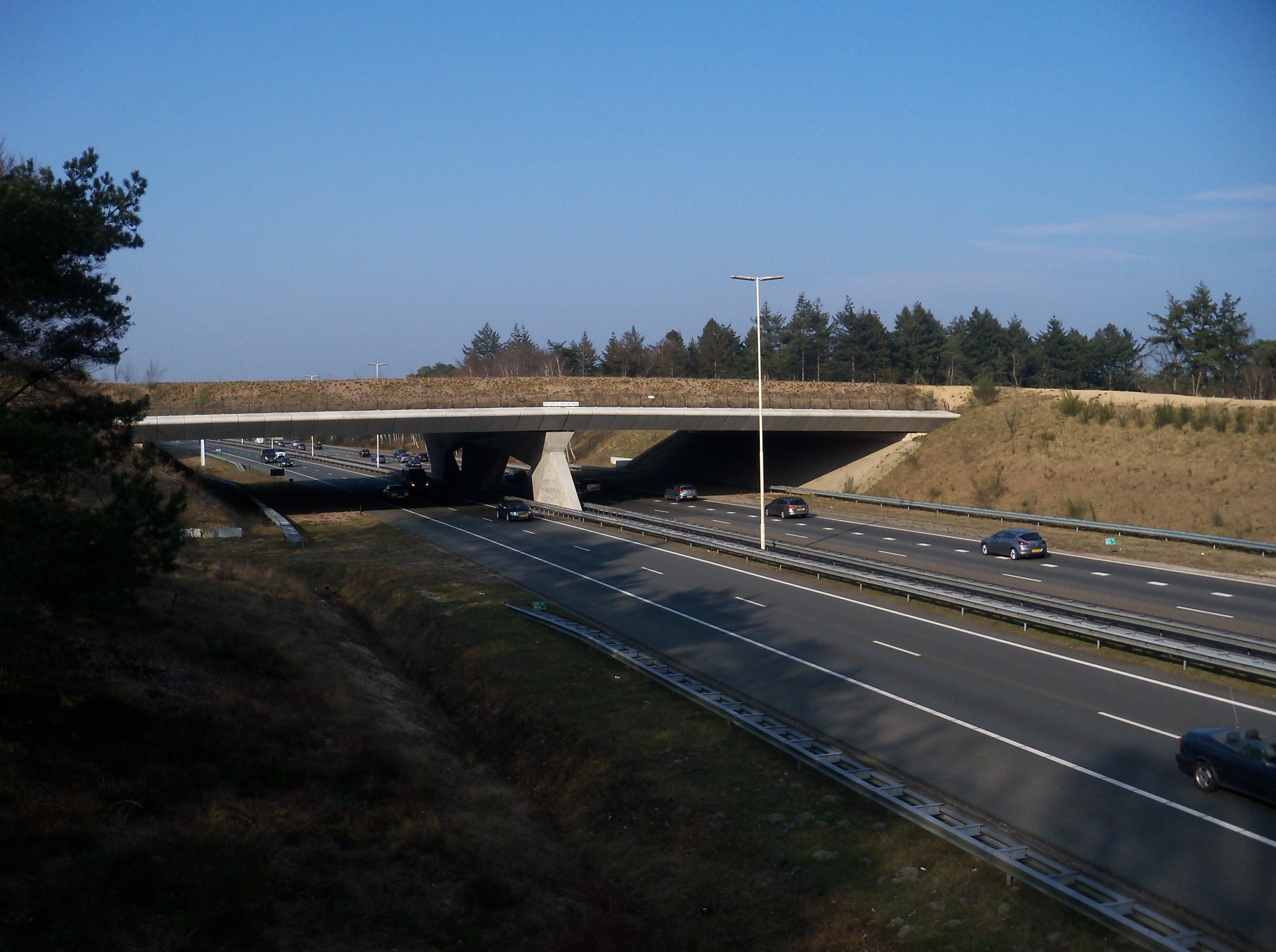 17 maart 2015 Ecoduct over de A27